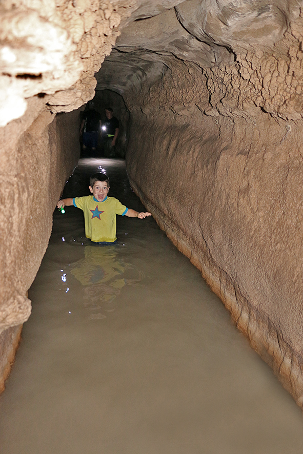 קטע הנקבה בפארק אלונה